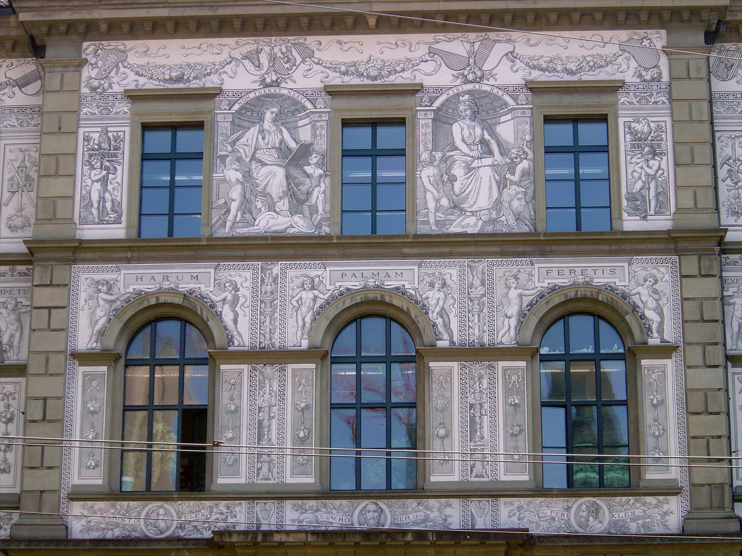 Detail der freskengeschmückten Fassade des ETH Hauptgebäude in Zürich an der Tannenstrasse